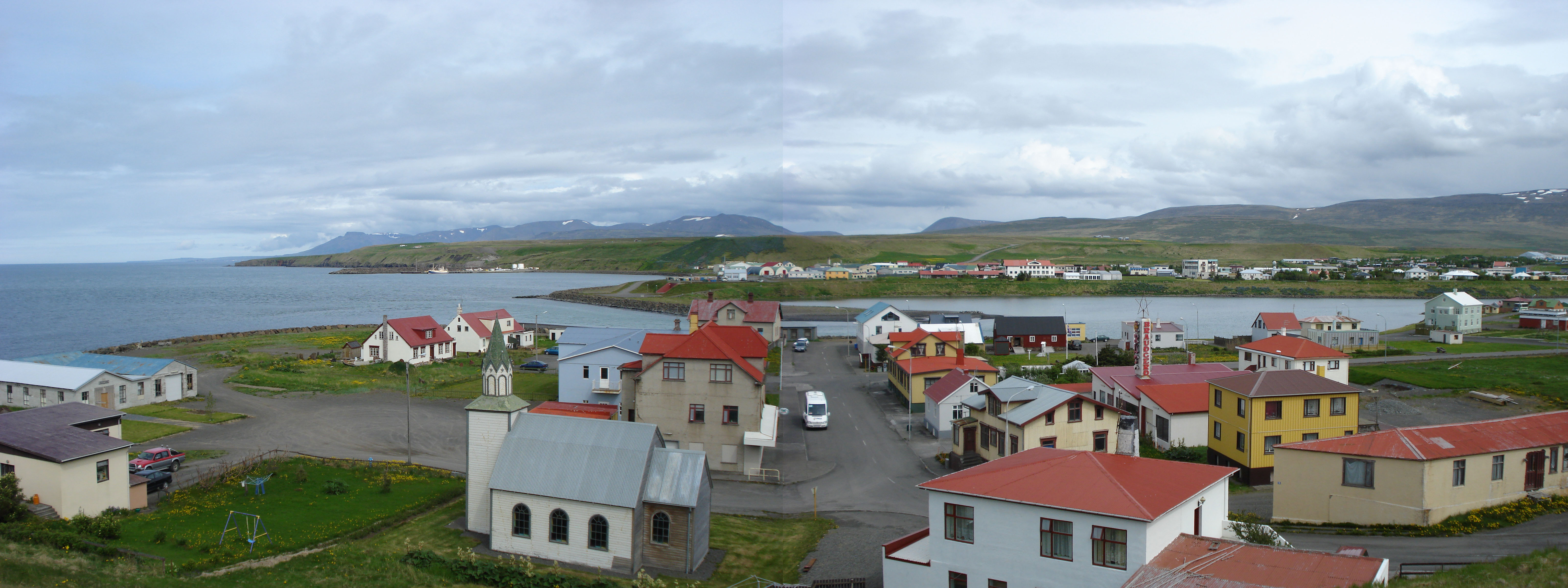 Panorama Blönduós, Iceland